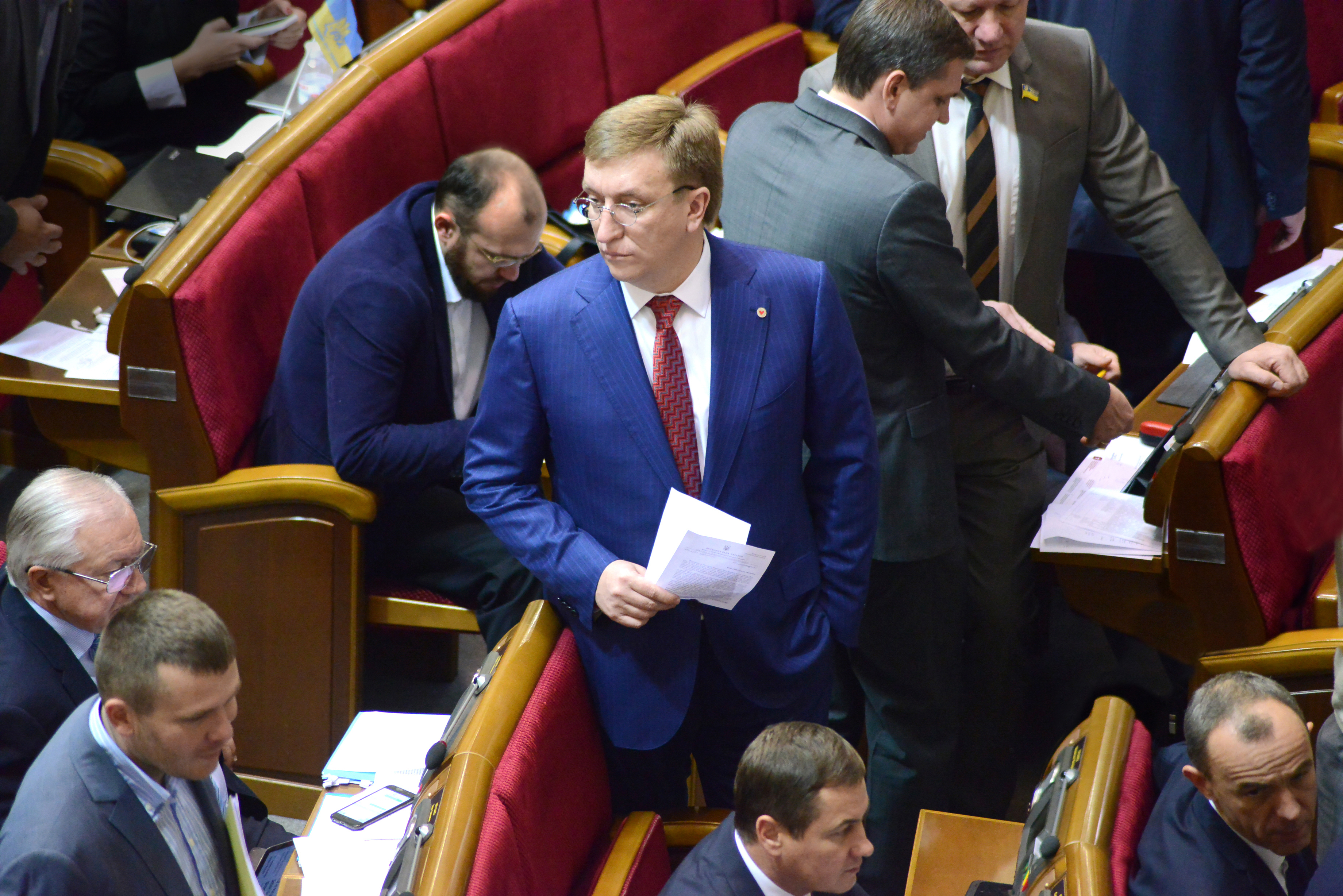 ВЕРХОВНАЯ РАДА УКРАИНЫ 2016 год, фото Вадим Чуприна